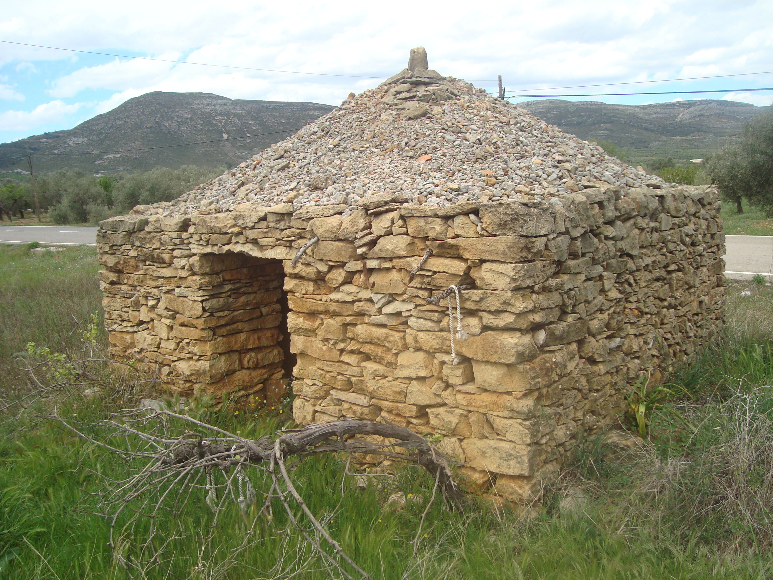 Barraca de planta cuadrada, construida en el año 1950 con la técnica de la piedra seca (Albocàsser)